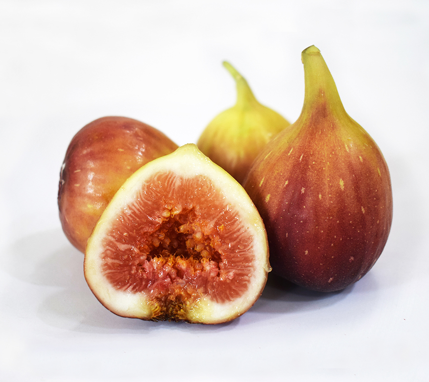 Quả Sung Mỹ chín